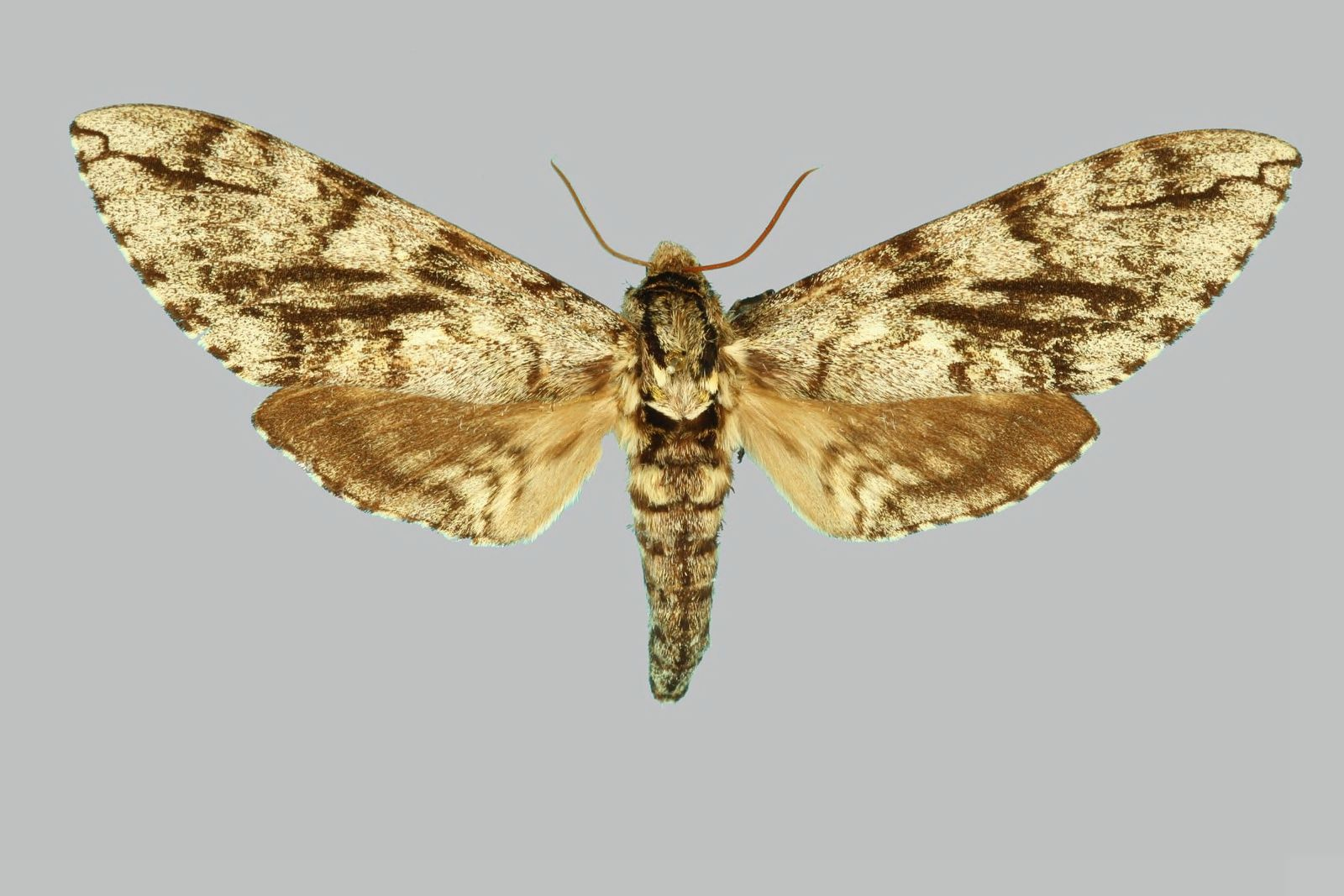 Ceratomia sonorensis, female, upperside. United States, Arizona, St. Cruz, Pena Blana